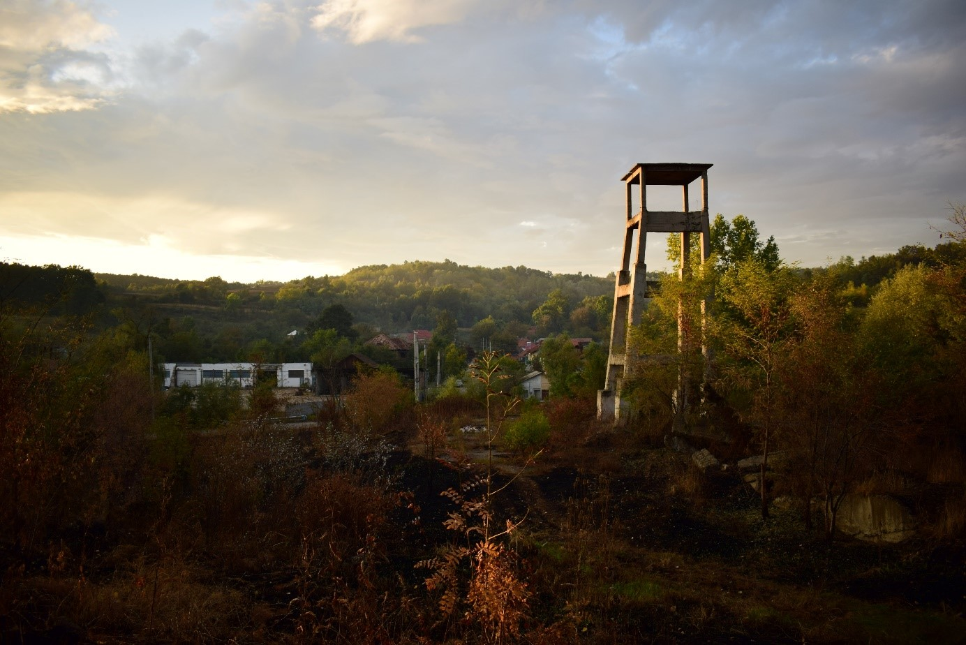 Panorama satului Horăști